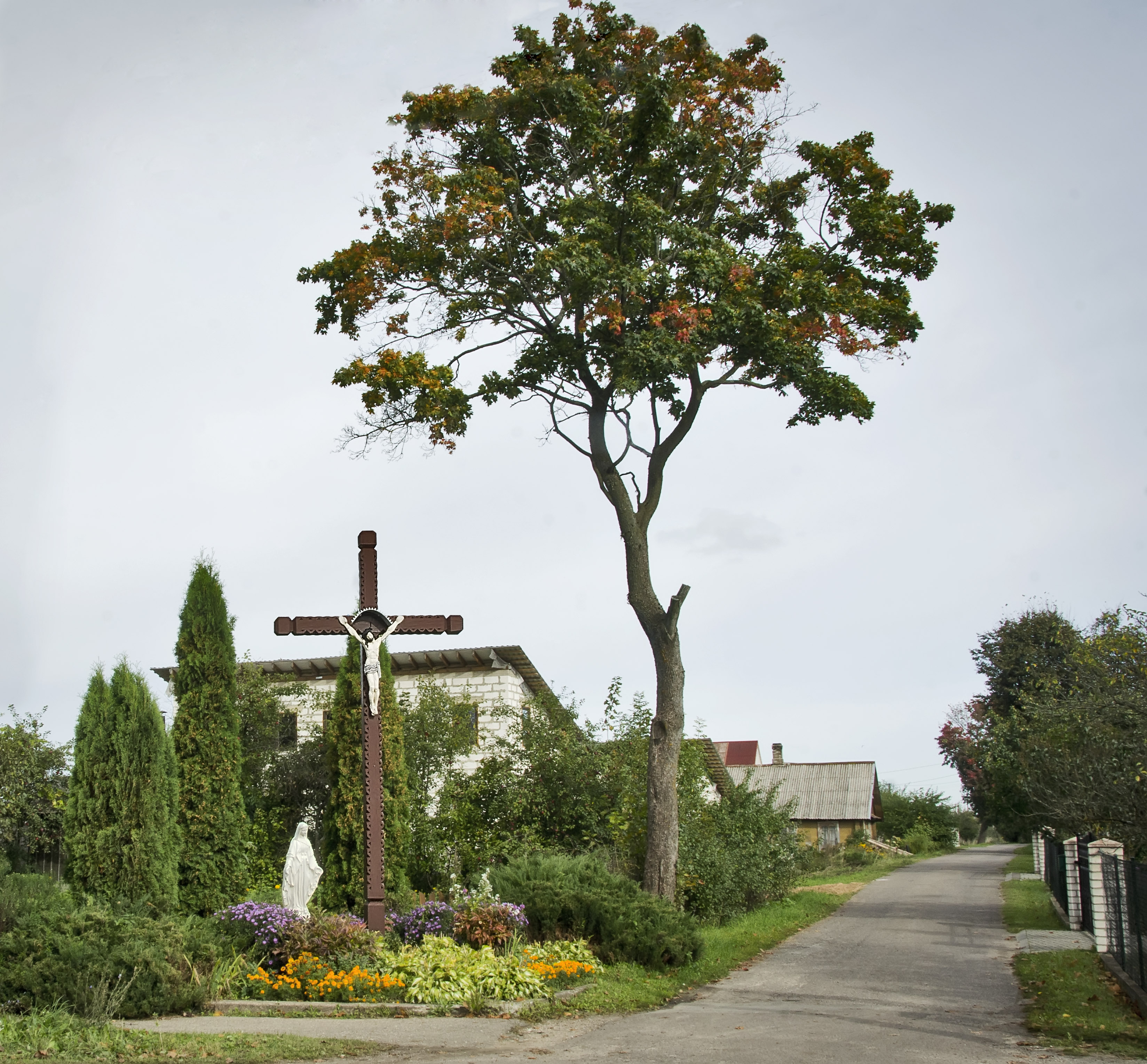 Medžiukų miestelio gatvė.